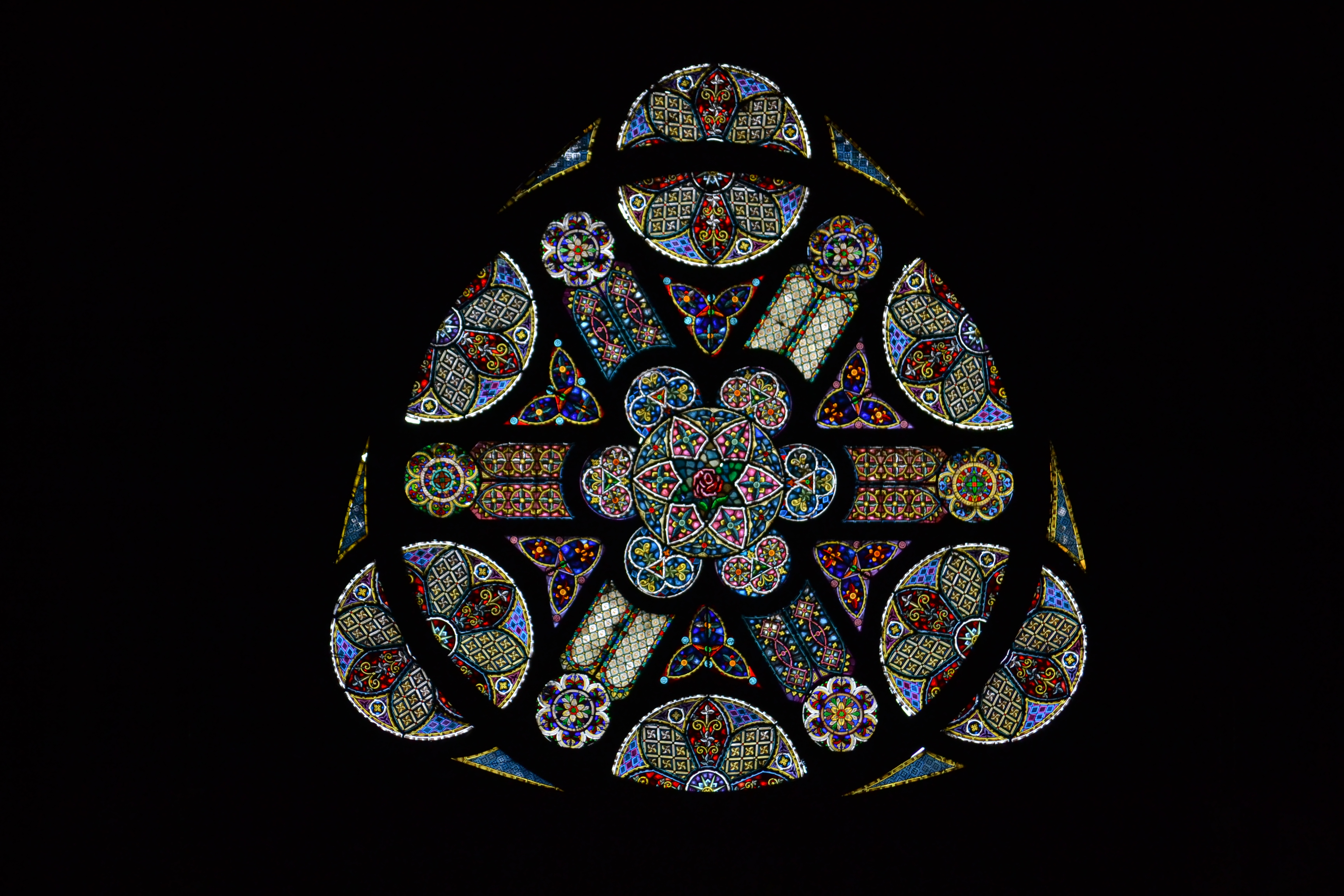 Vitral en forma de roseta. Uno de los más bellos de la Catedral